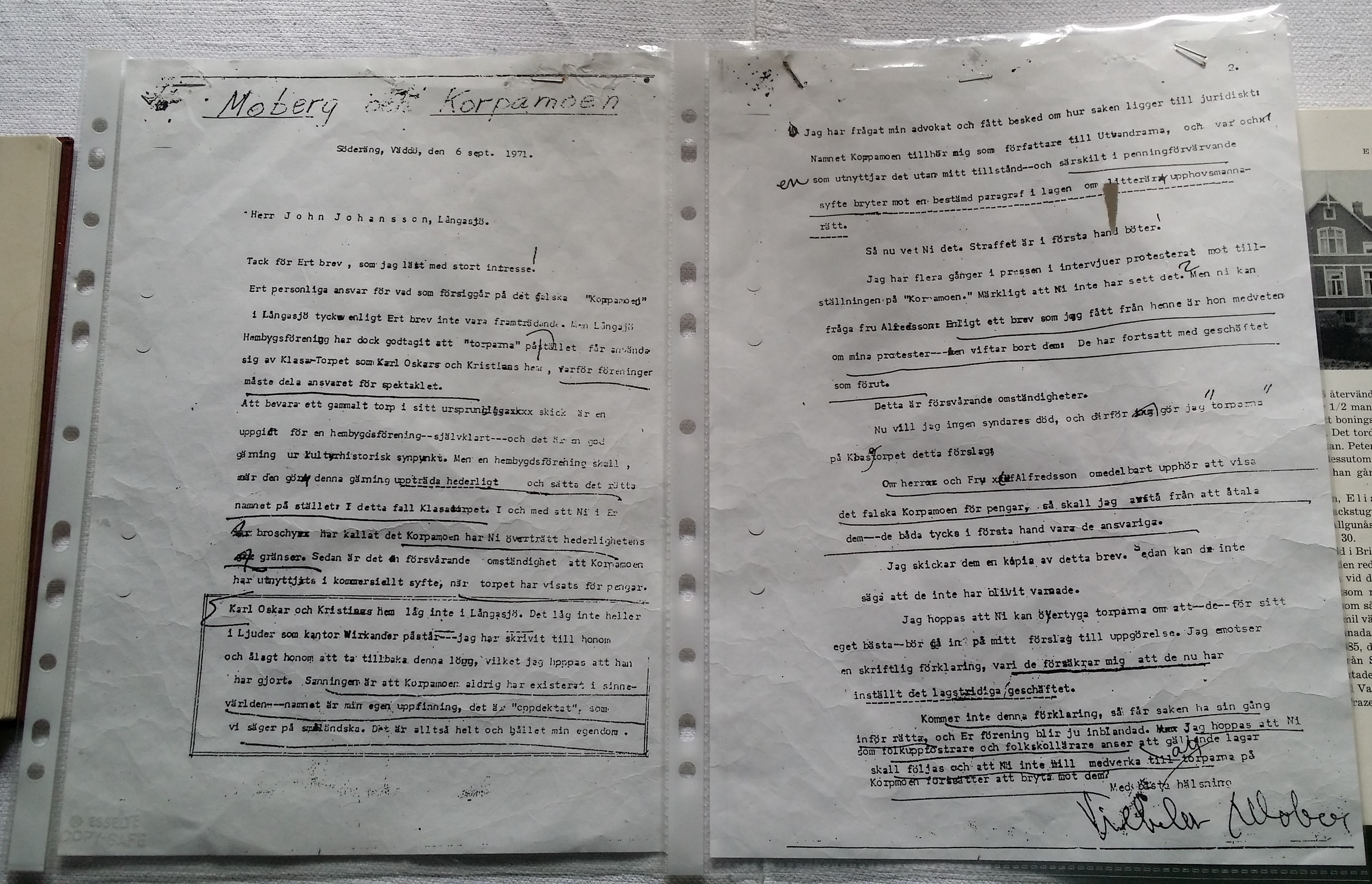 Vilhelm Mobergs brev om Korpamoen till John Johansson i Långasjö. Finns att beskåda på Klasatorpet i Småland.